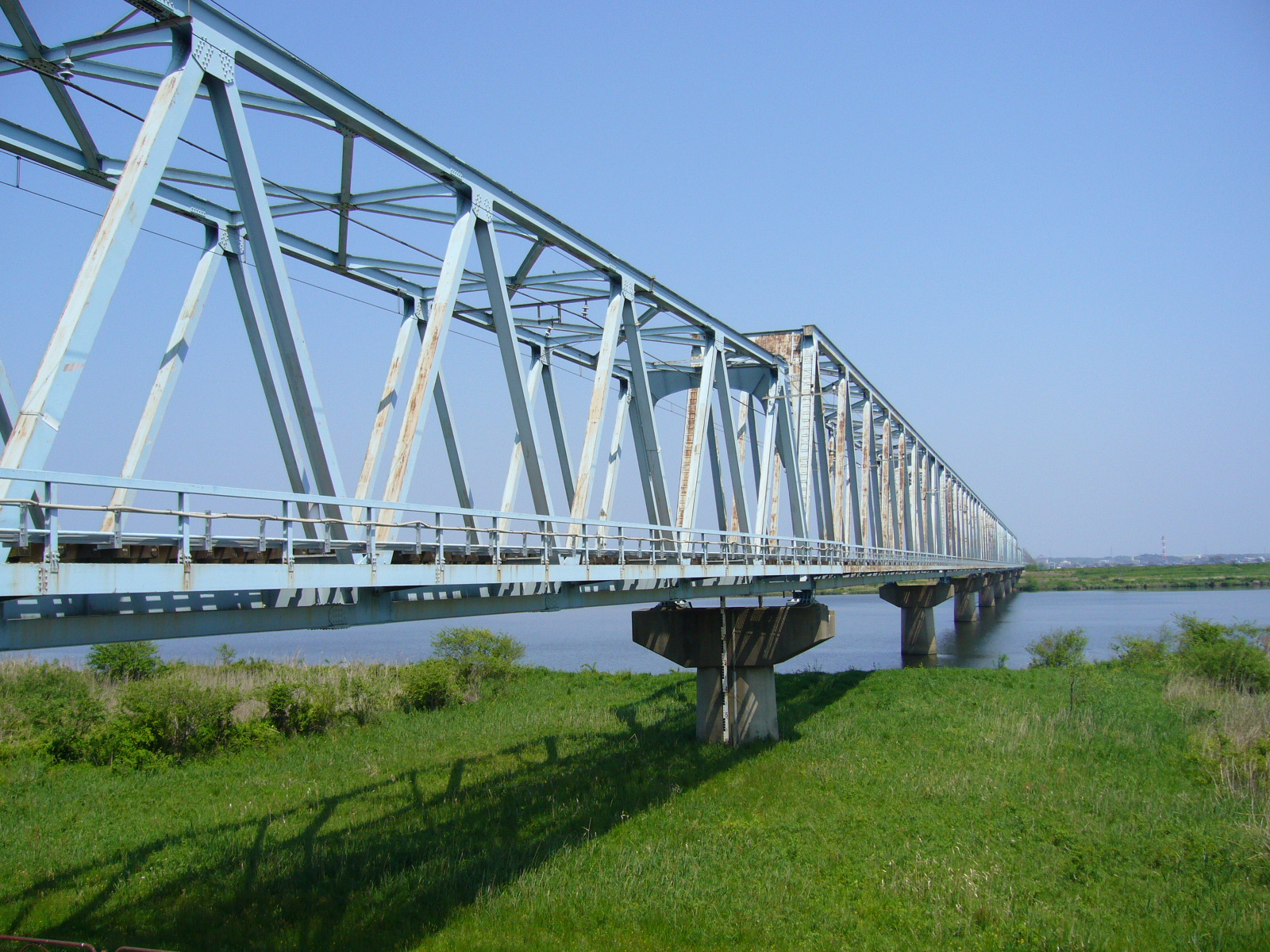 tonegawa-bridge,JR-kashima-line,katori-city,japan 鹿島線利根川橋梁